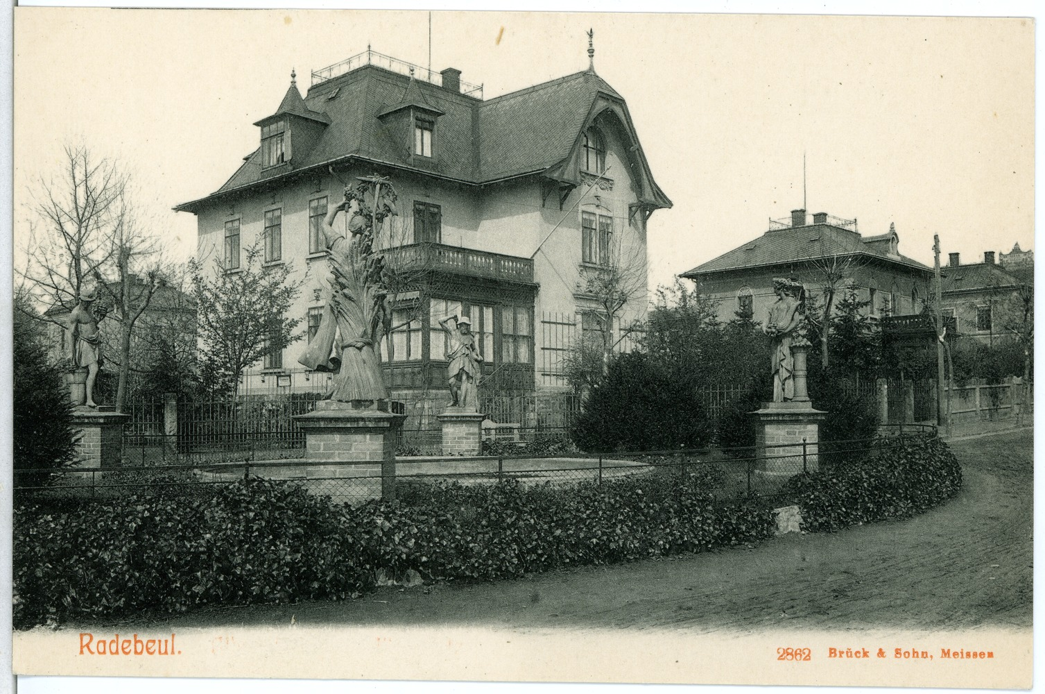 Radebeul; Kaiser Friedrich Allee mit Fontainenplatz This postcard is from publisher Brück & Sohn in Meißen ( postcard has a unique number 02862 and is available in a higher resolution at the publisher. This images was uploaded in a cooperation project between Wikipedians and the publisher.